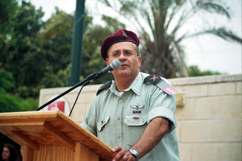 ד"ר חזי לוי